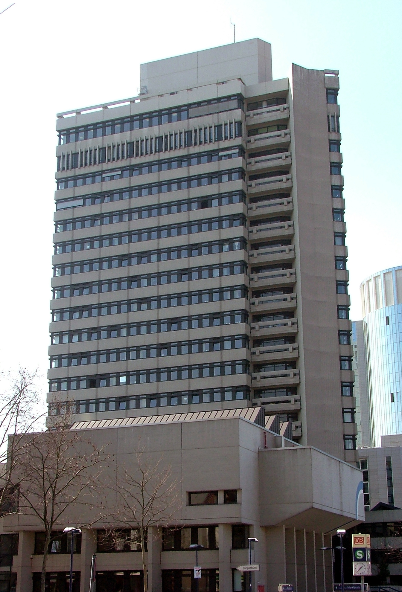 Rathaus Offenbach am Main